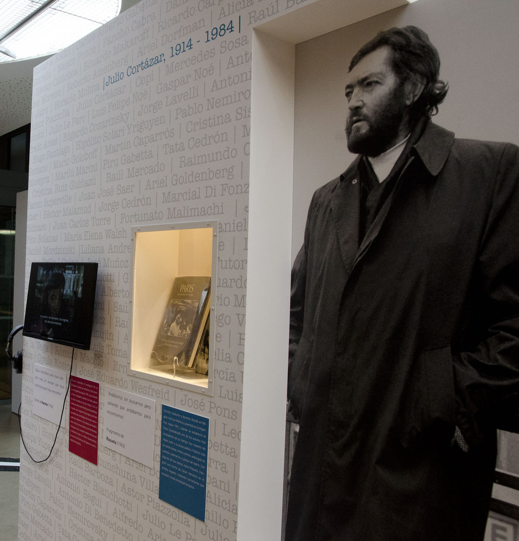 Sitio dedicado al escritor argentino Julio Cortazar en la exposición “Tierra de luz. Cultura y solidaridad franco-argentina”, una muestra en que Argentina rinde homenaje a Francia, en el Ministerio de la Cultura y la Comunicación de Francia.